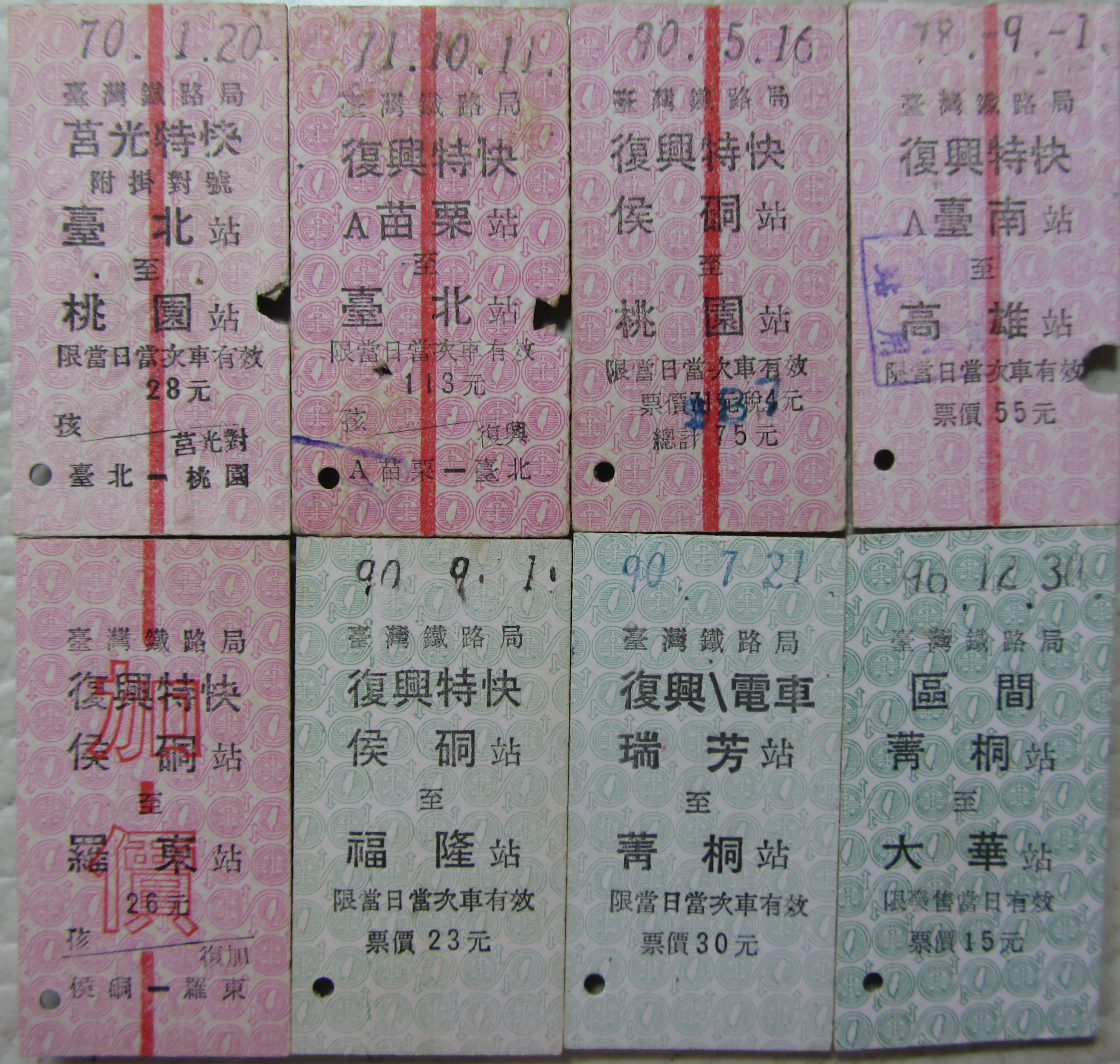 臺灣鐵路管理局各時期印製的復興號名片式車票